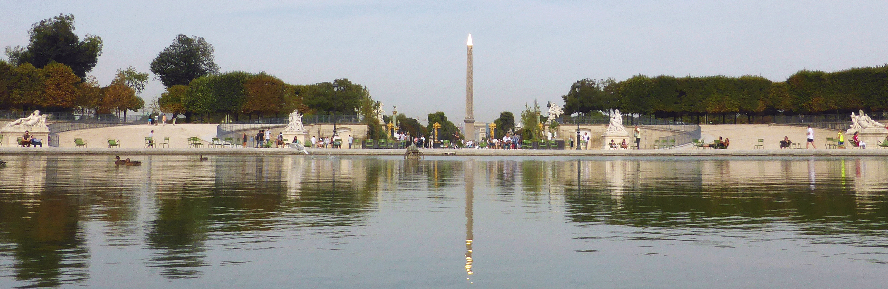 Jardin des Tuileries Bassin Octogonal Fer à Cheval Obelisk Place de la Concorde Paris Frankreich - Foto Wolfgang Pehlemann P1020415